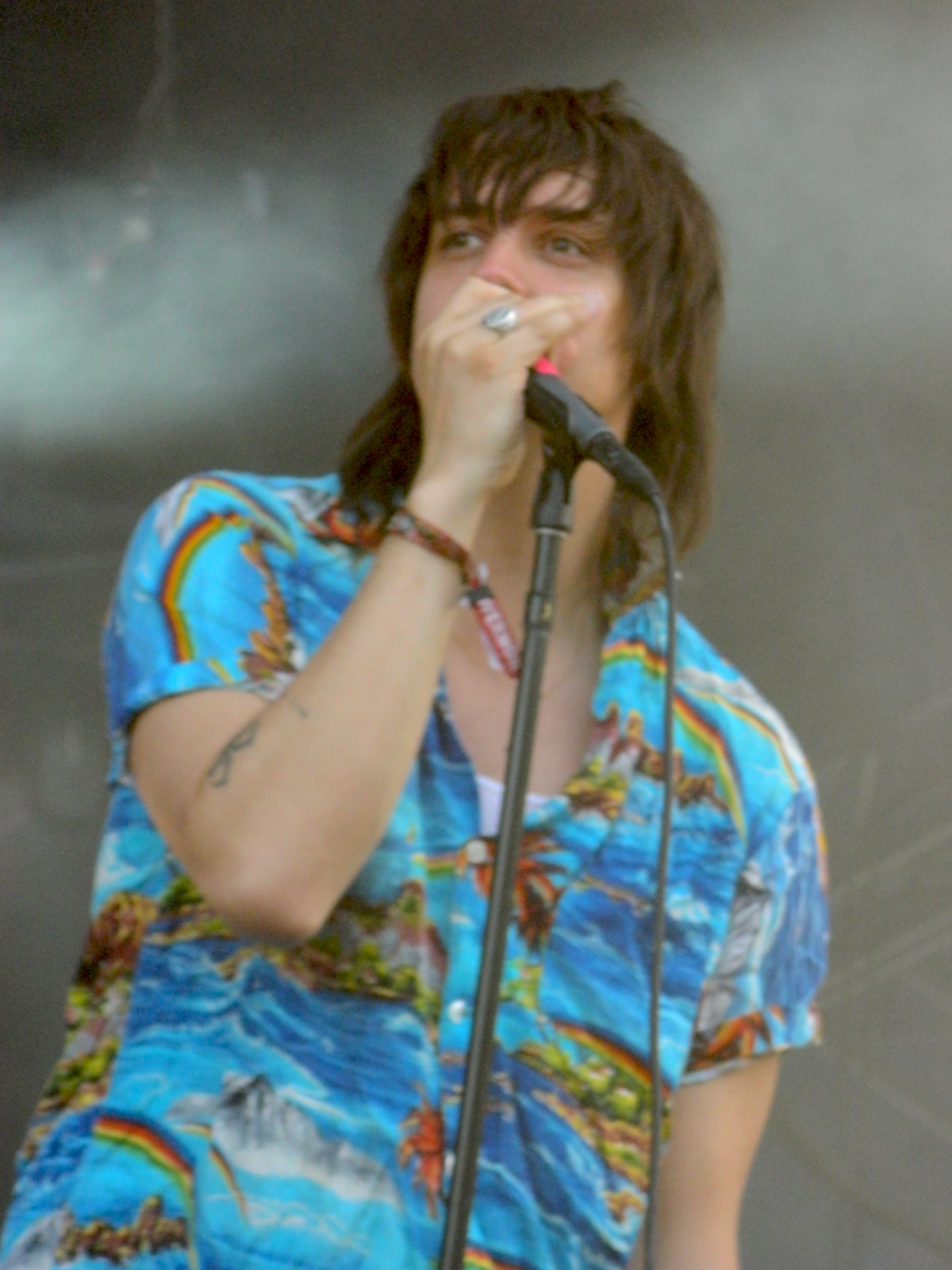 Julian Casablancas @ Governor's Ball 2014